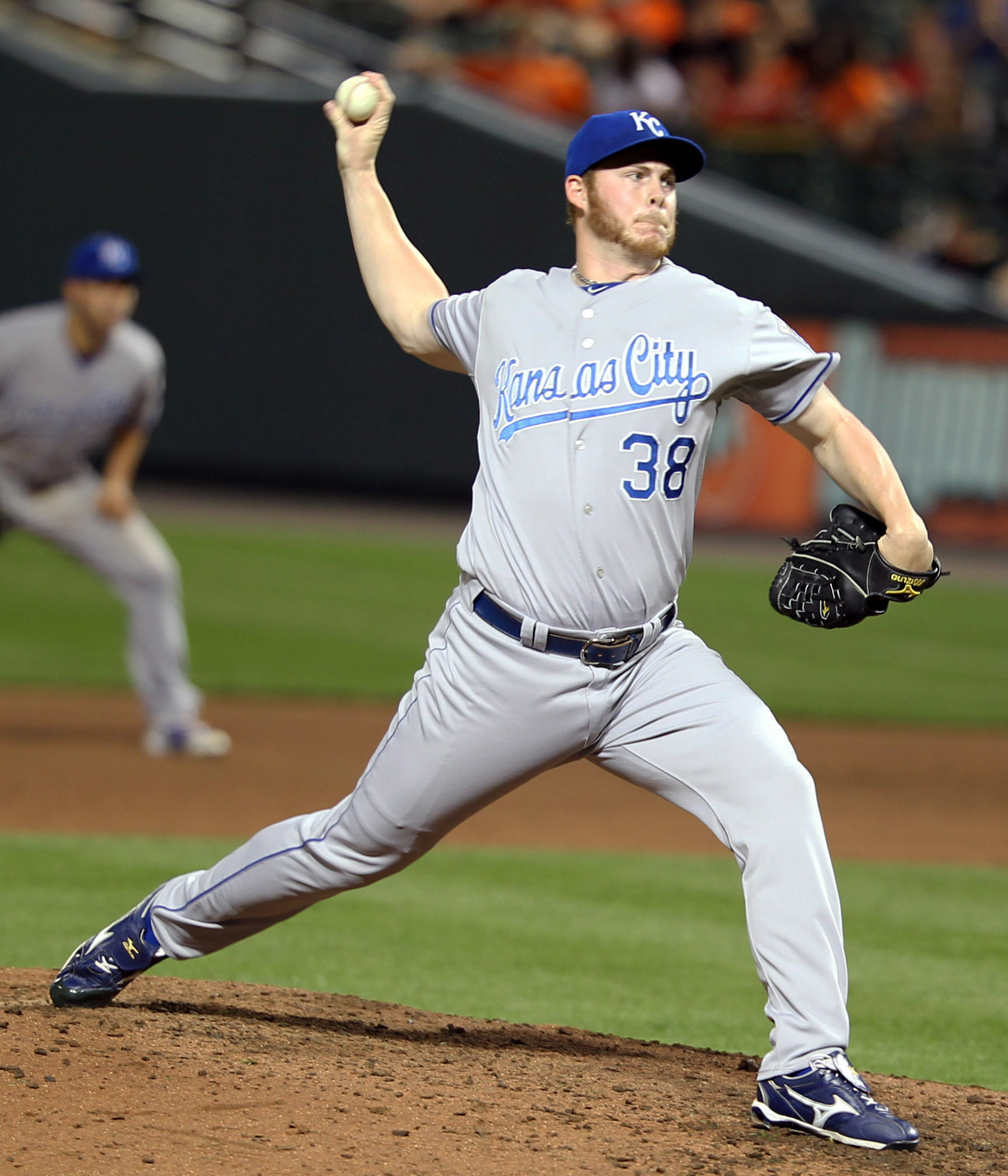 Blake Wood